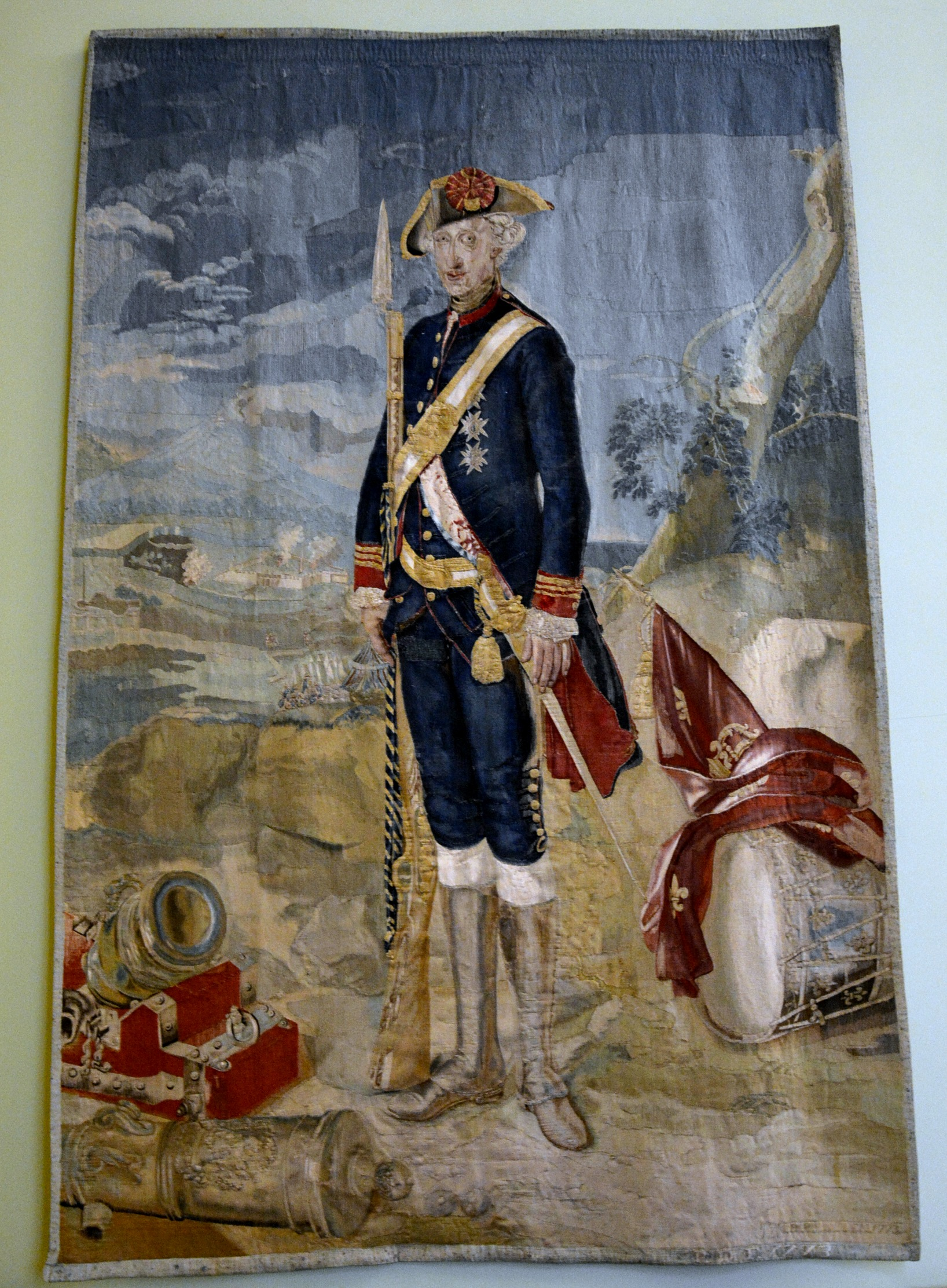 Vedi titolo